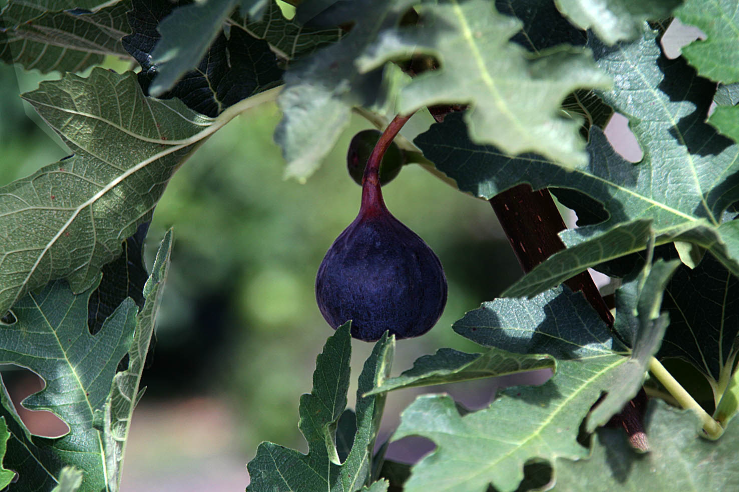 Ficus afghanistanica avec fruit